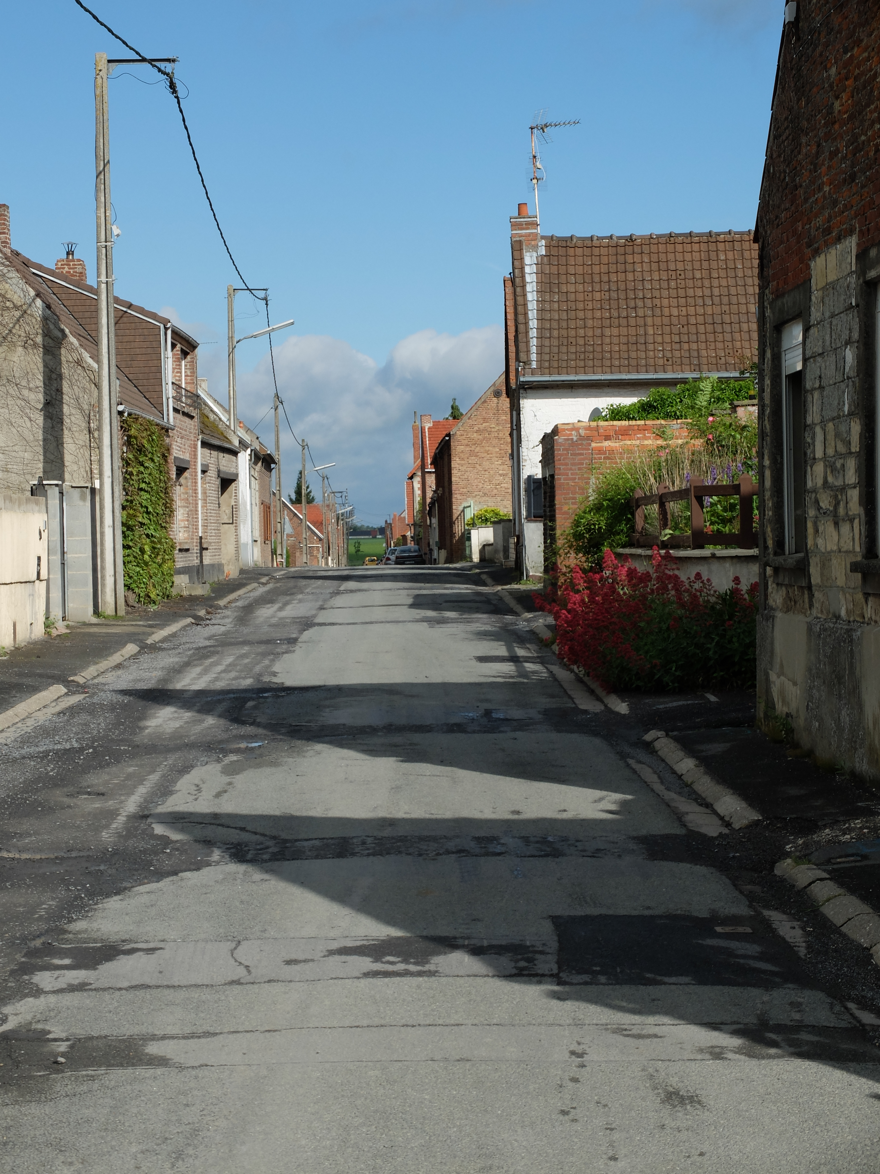 Vue de la "rue d'en haut" de Brunémont.